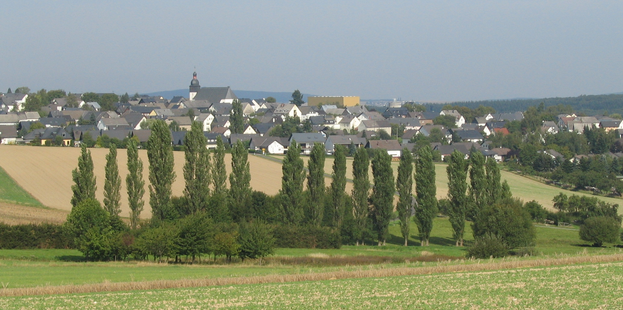 Mastershausen